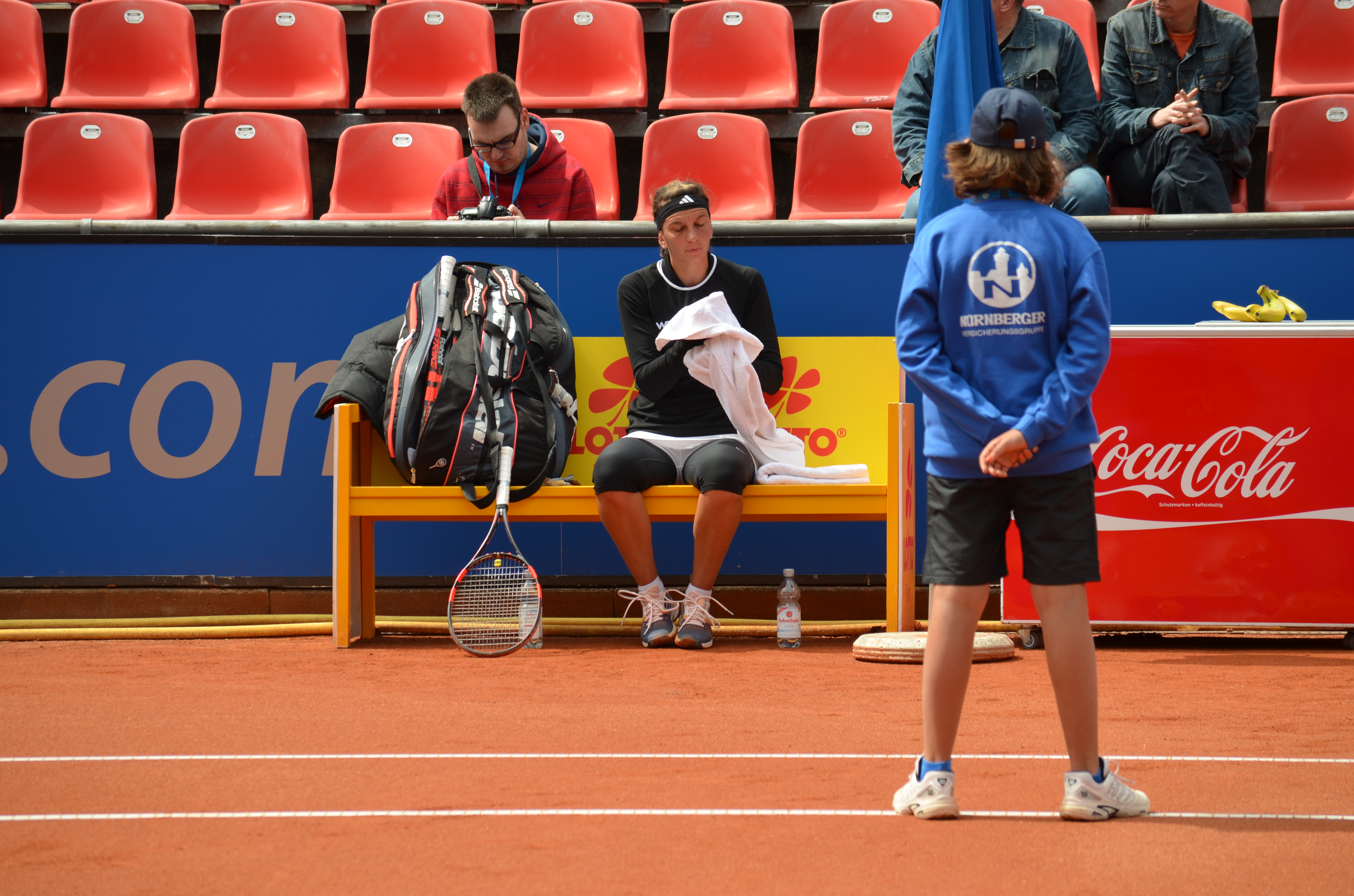 Ana Vrljic beim Erstrundenspiel der Qualifikation des Nürnberger Versicherungscup 2014 gegen Katharina Gerlach